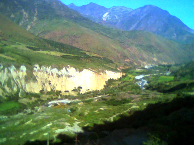 Paisaje Huana Huana